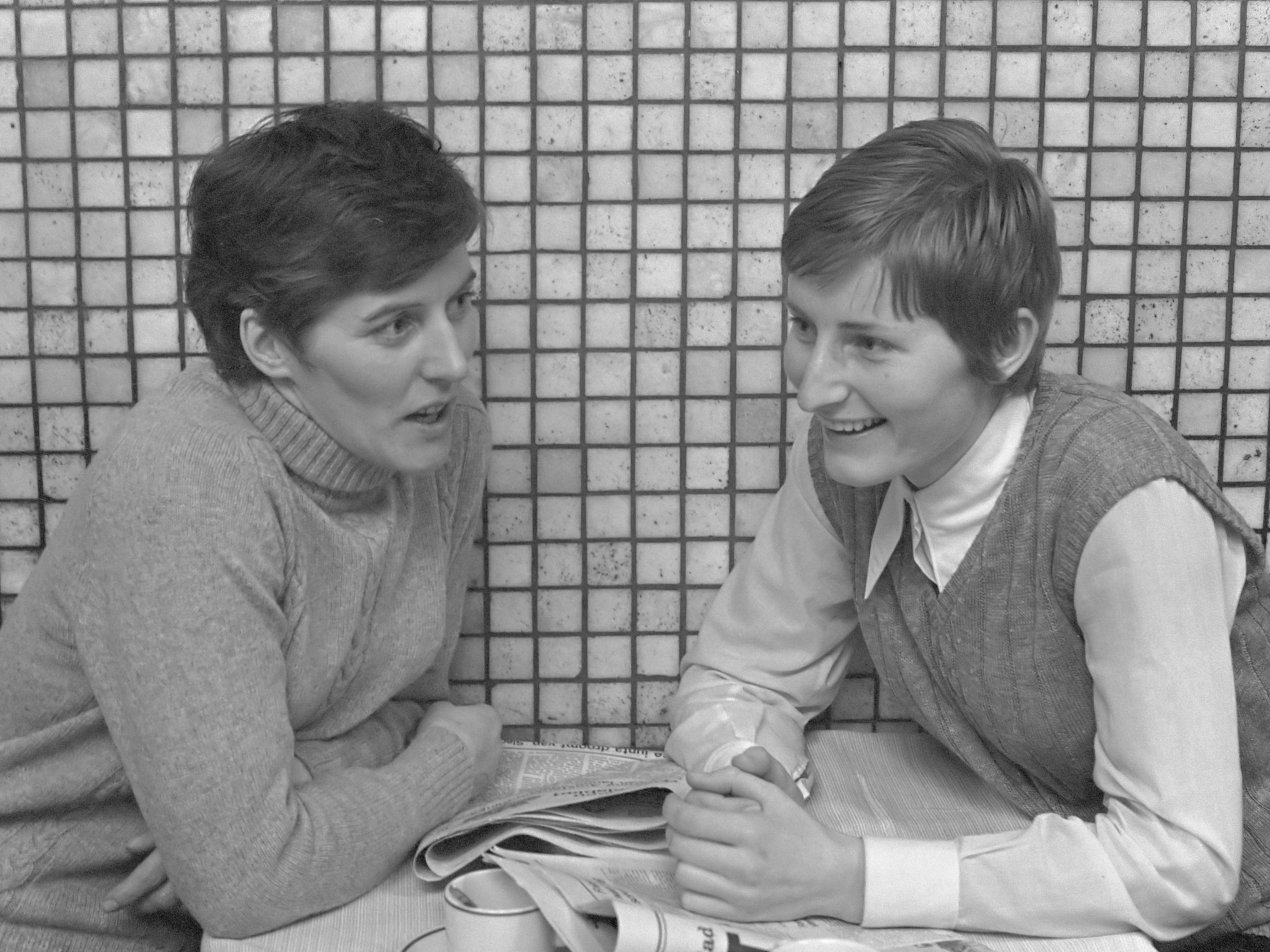 Damesschaatsploeg vertrekt van CS te Utrecht naar Davos. Links Atje Keulen-Deelstra, rechts Akke Falkena 12 januari 1970